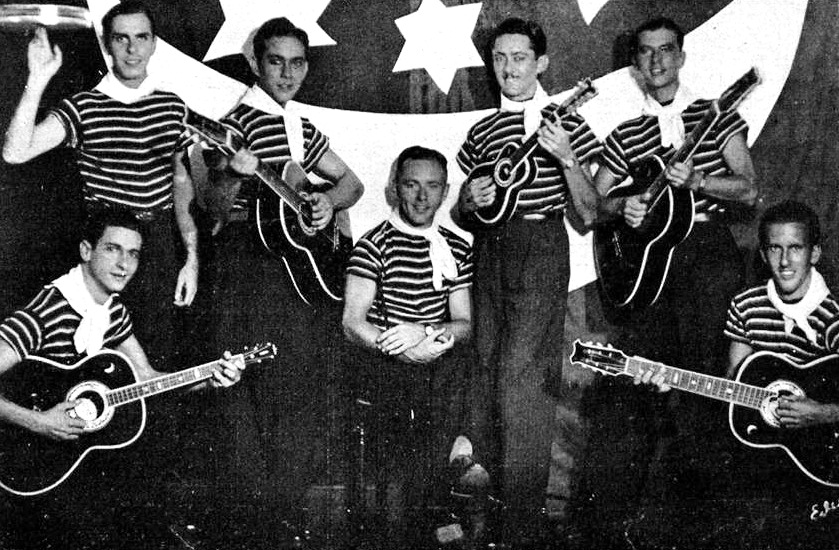 O conjunto musical Bando da Lua em uma foto publicada pela revista brasileira O Cruzeiro em 1934.